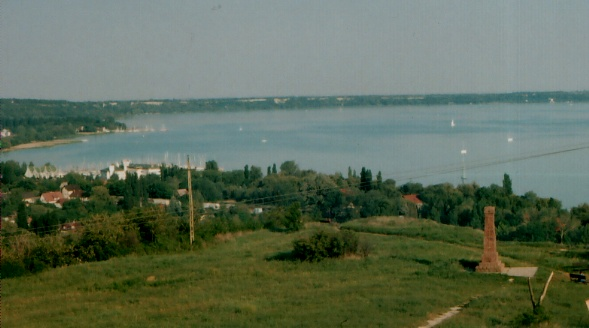 A balatonkenesei Soós-hegy (Veszprém megye, Magyarország)